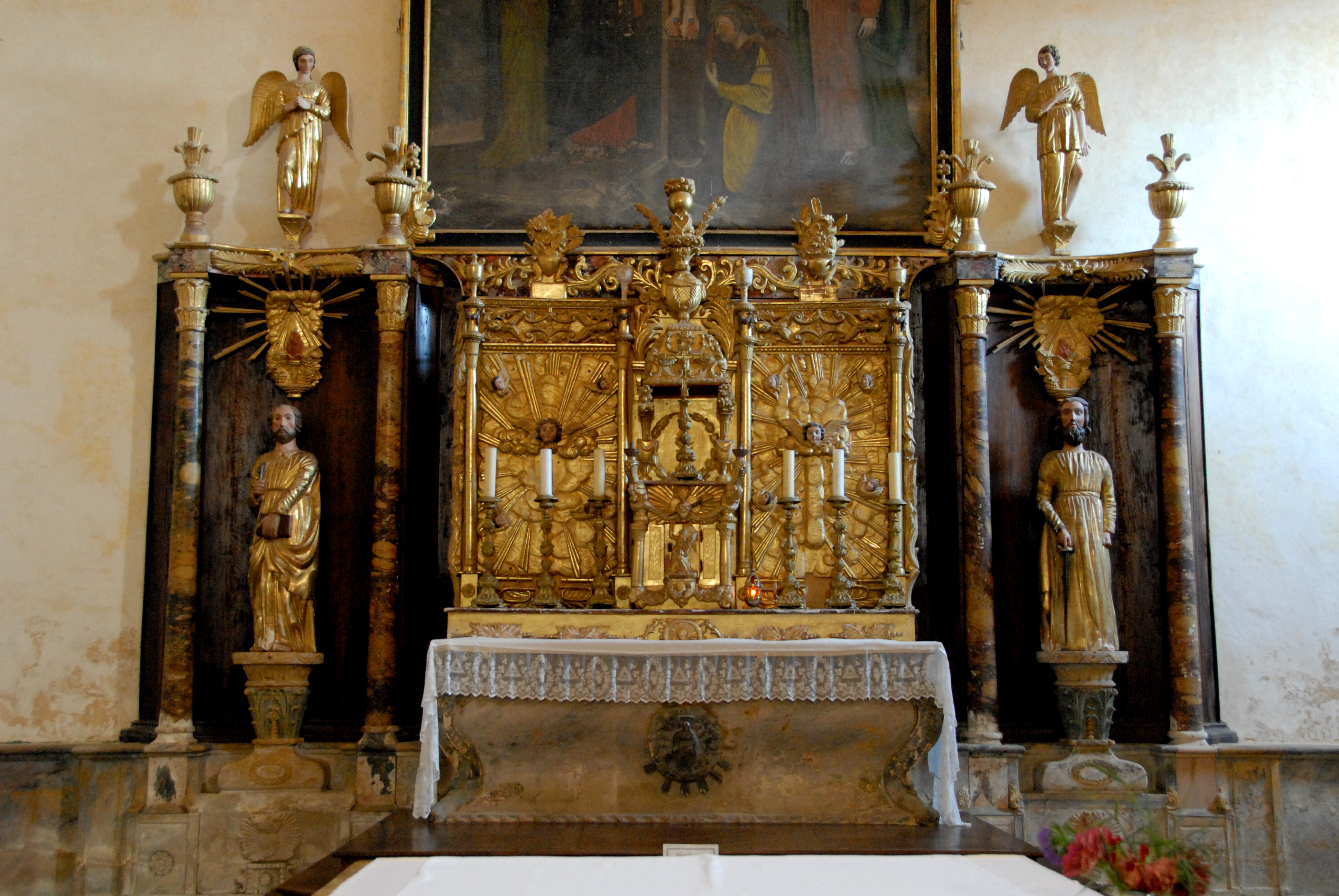 St.-Avit-Sénieur, Hauptaltar